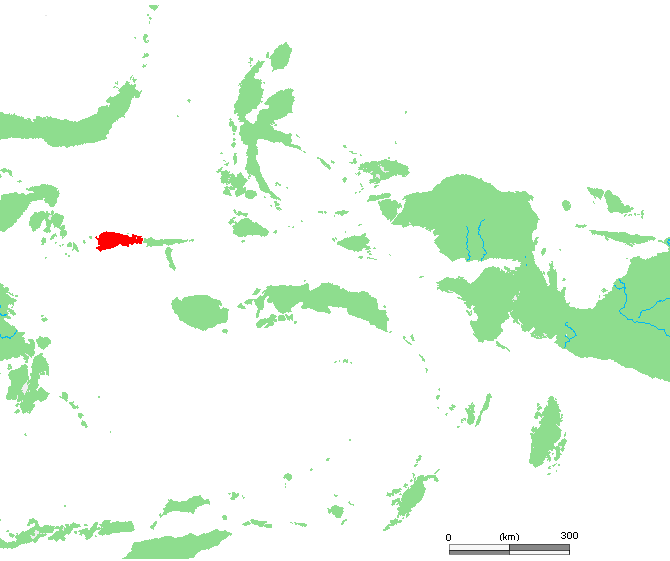 ID Taliabu.PNG